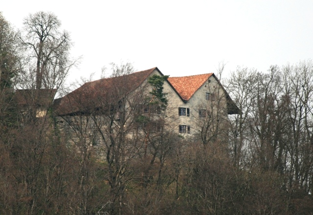 Schloss Brunegg, Aargau, Schweiz